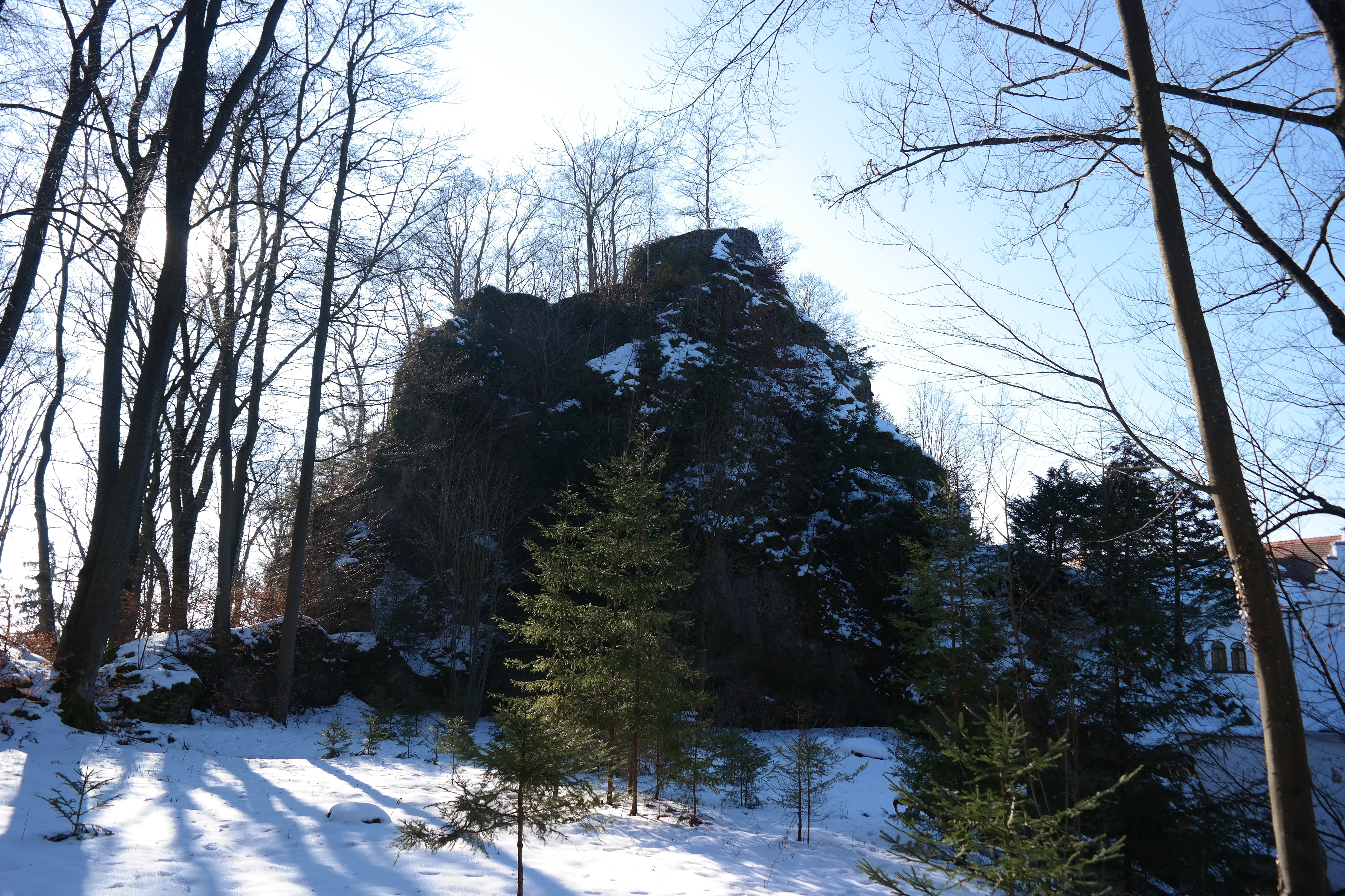 Burgruine Neidenstein - Ansicht des Burgfelsens mit Mauerresten aus östlicher Richtung